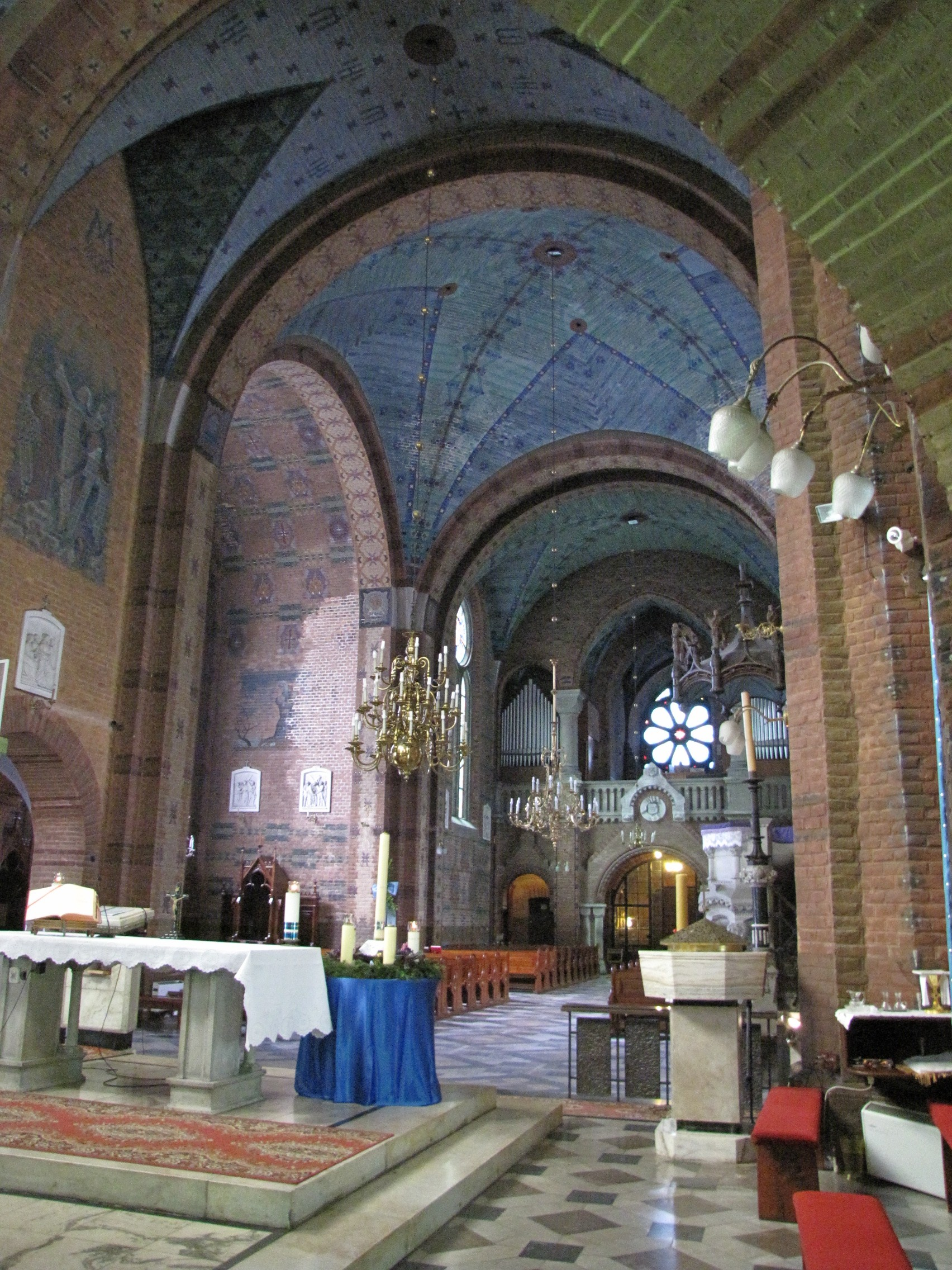 Kosciol Nawiedzenia NMP Suchej Beskidzkiej - wnętrze